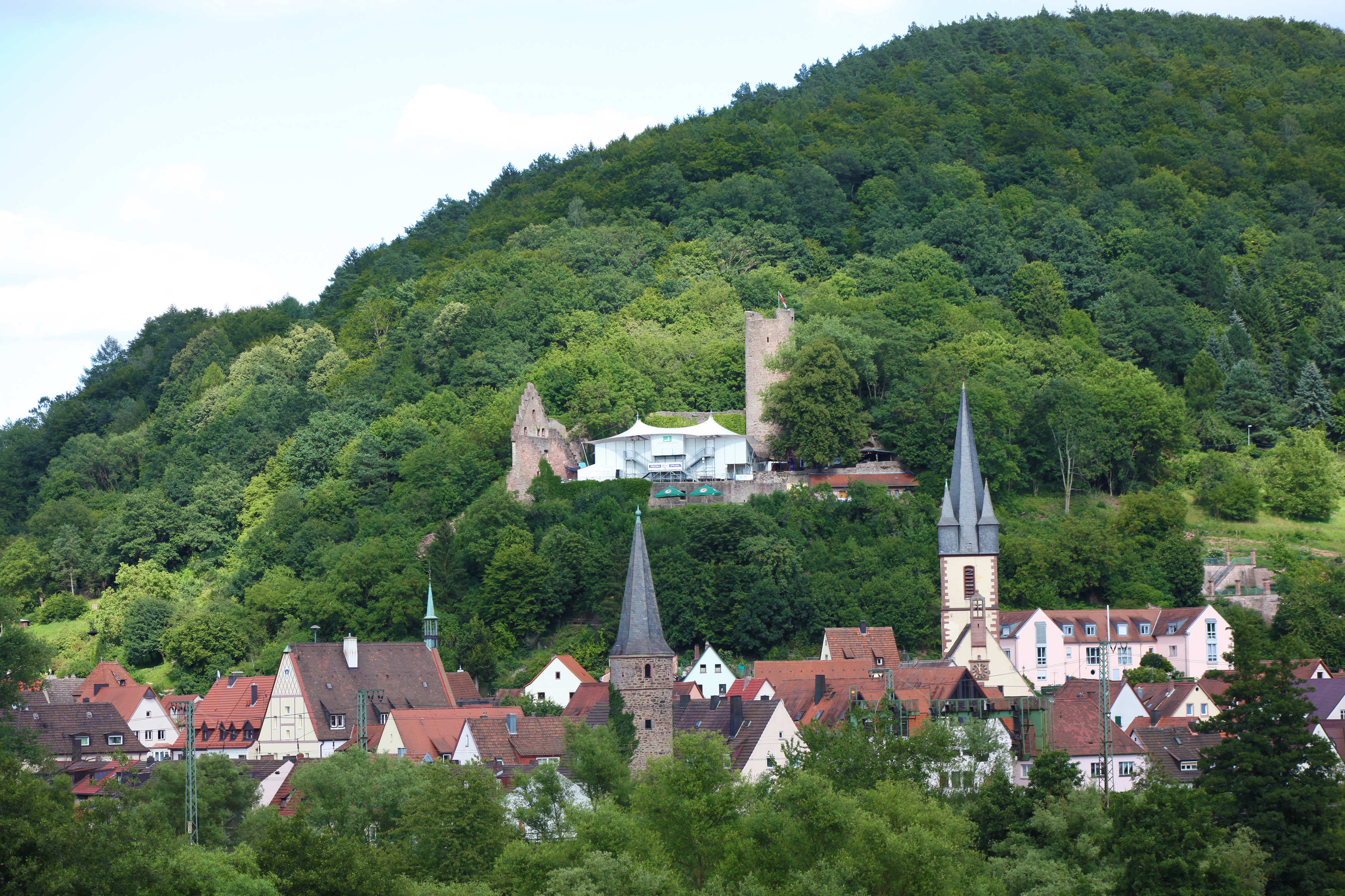 Bitte Copyright beachten